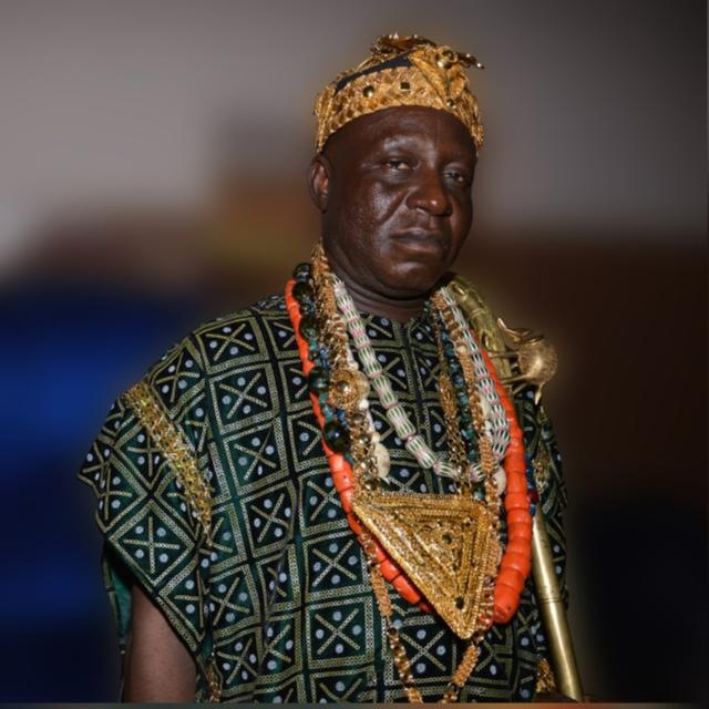 Le roi de Savalou en image dans le palais royale